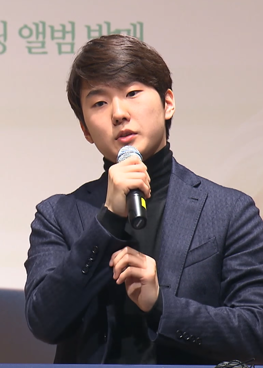 피아니스트 조성진 첫 정규 앨범 '쇼팽: 피아노 협주곡 1번 발라드' 발매 기자회견